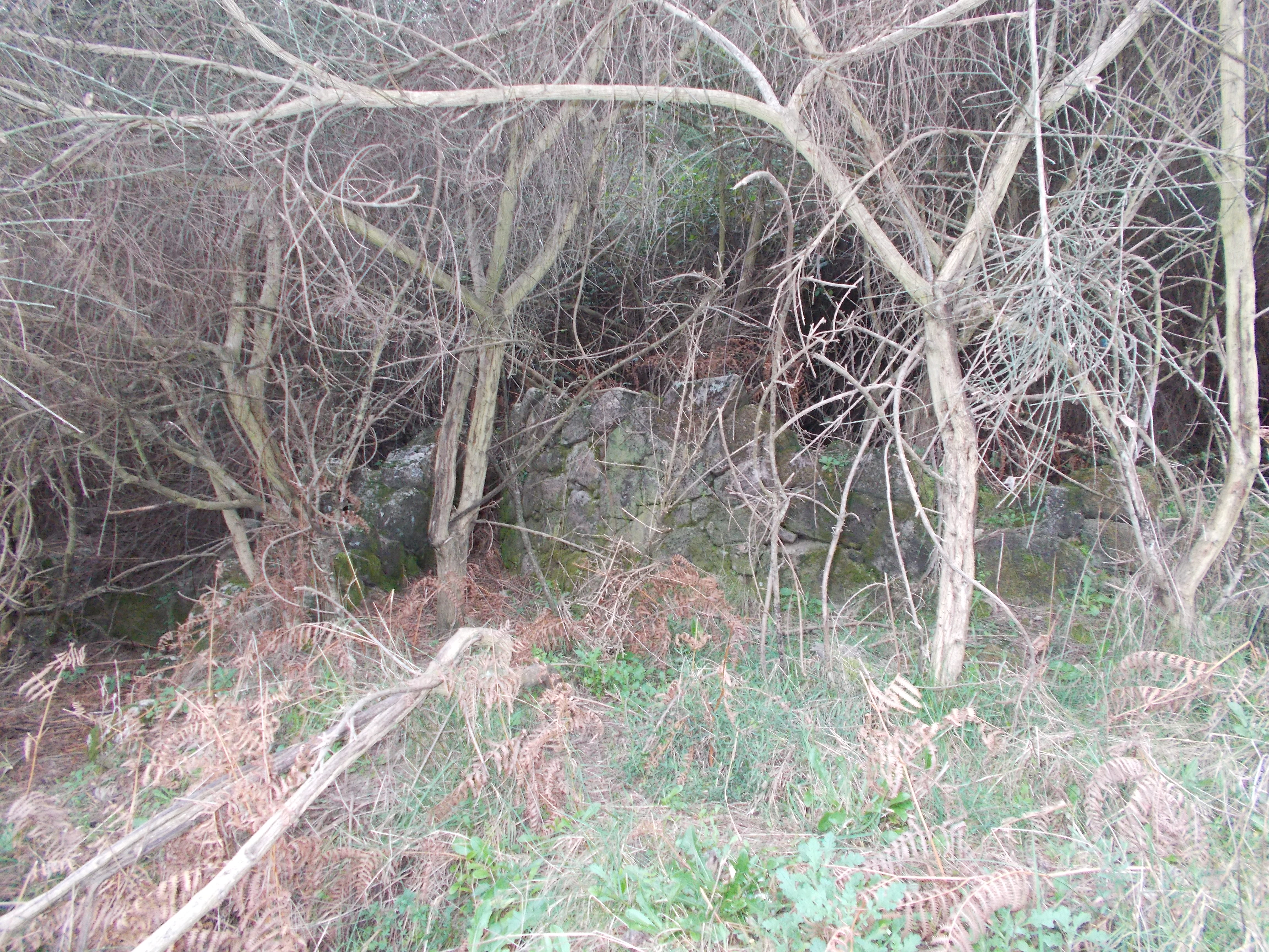 Citânia de São Julião de Caldelas, Ponte São Vicente, Vila Verde, em 2020. As casas no meio da giesta:" deteriora-se dia-a-dia, por acção de mão humana e da agressividade da natureza, uma magnifica citânia, do tipo do Noroeste Peninsular". Jornal de Noticias, artigo de Carlos Ribeiro, 1979. Imóvel de Interesse Público pelo Decreto nº 28/82, DR, 1ª Série, nº 47, de 26 fevereiro 1982